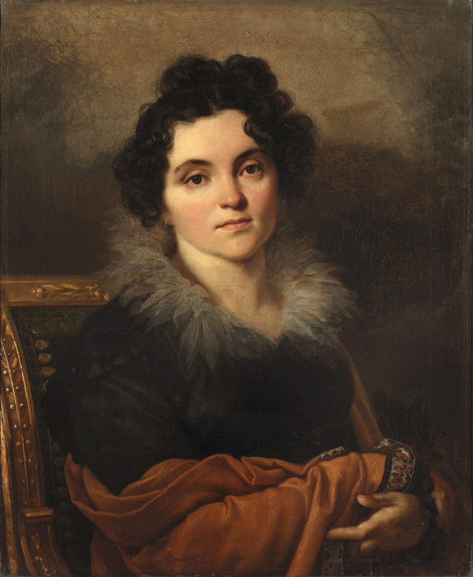 Дарья Николаевна Хвостова (1786-?), дочь генерала Н.Д.Арсеньева и В.И.Ушаковой. Её мать и старшую сестру писал Боровиковский. Сестры Арсеньевы приходились троюродными сестрами М.М.Арсеньевой, матери М.Ю.Лермонтова. Дарья Николаевна была третьей женой Всилия Семёновича Хвостова (1754-1832). У них было два сына - Александр (1809-1861) и Дмитрий (1811 - 1860) и дочь Елизавета.